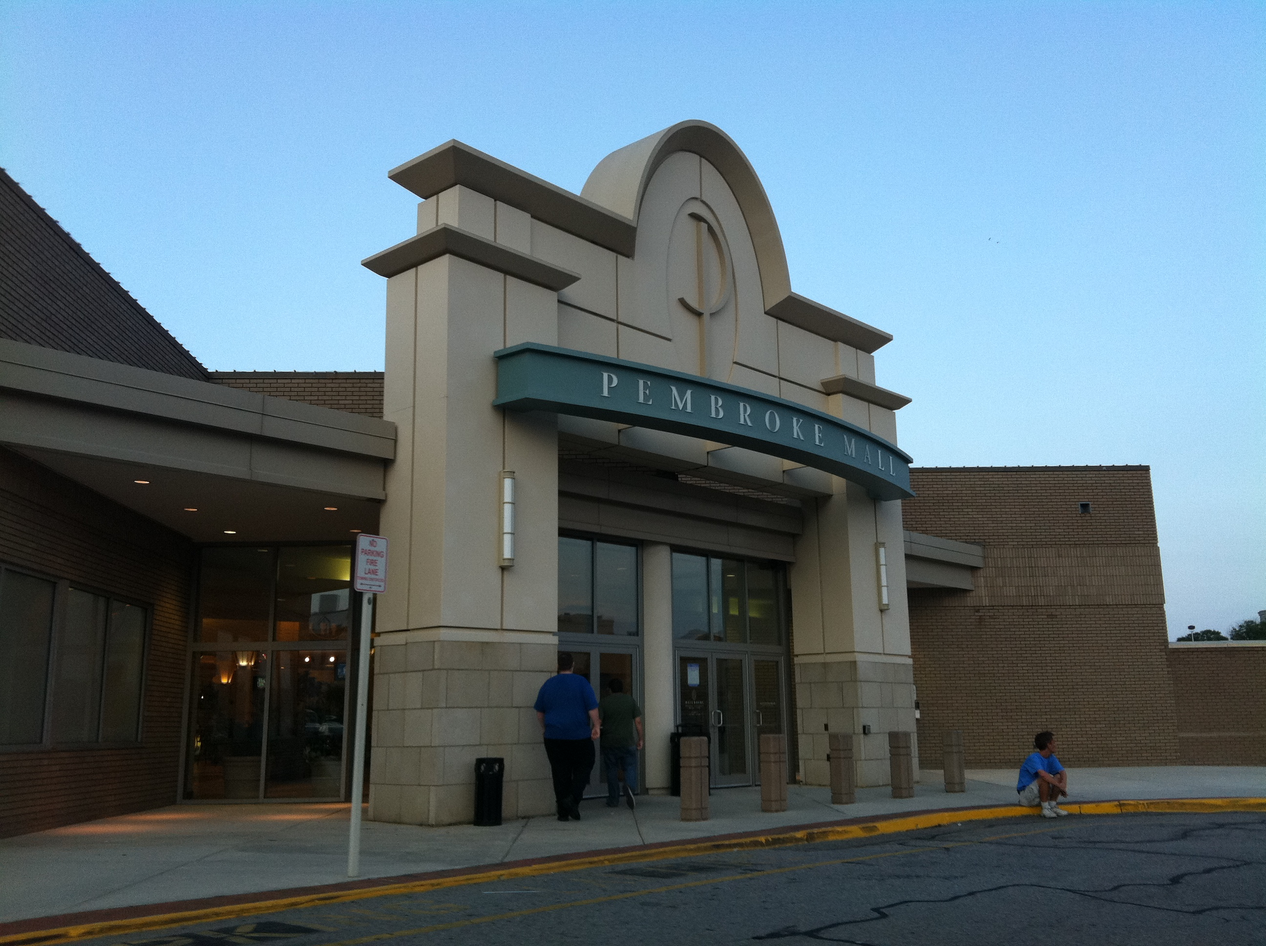 Pembroke Mall